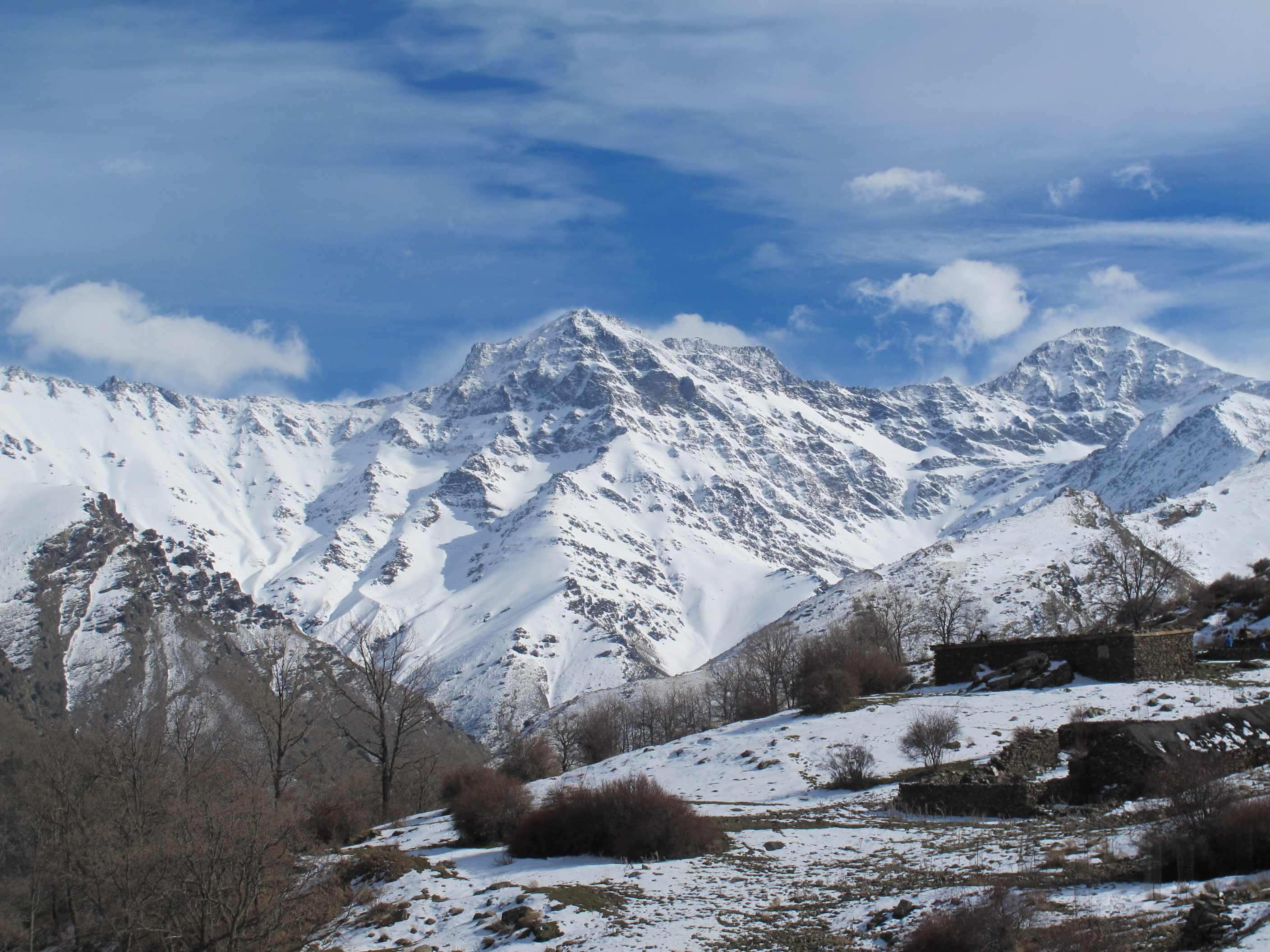 Sierra Nevada desde el refugio de El Hornillo This is a photography of a Special Area of Conservation in Spain with the ID: ES6140009. Natura2000 entry, EEA entry